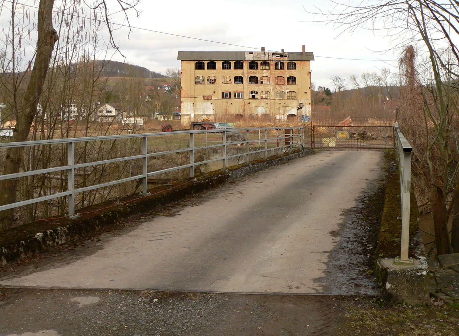 Deutsche Uhrglasfabrik Freden